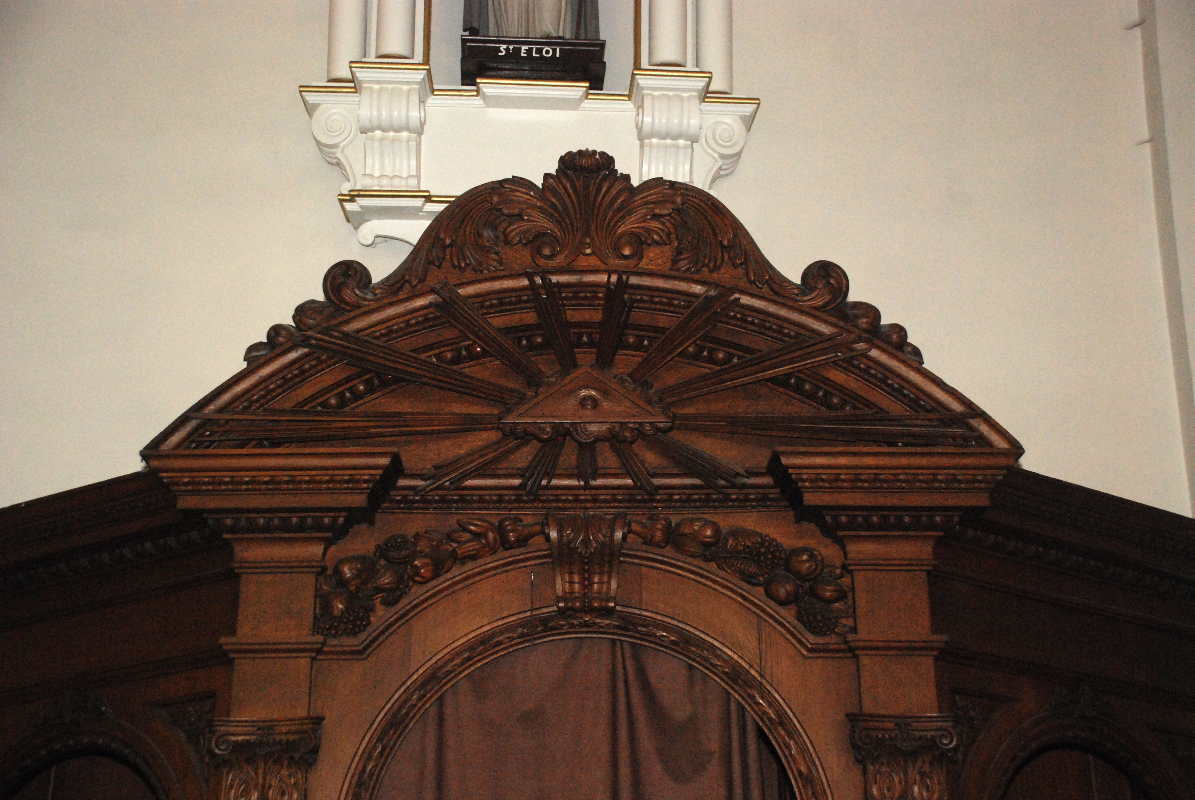 Belgique - Province de Namur - Viroinval - Nismes - église Saint-Lambert (1829)